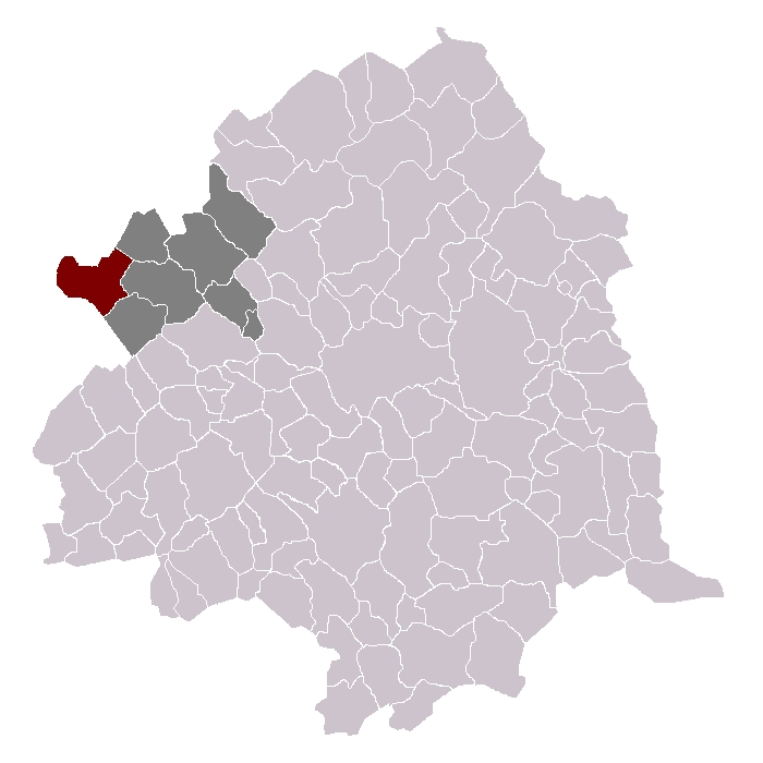 Erquinghem-Lys, canton d'Armentière, arrondissement de Lille